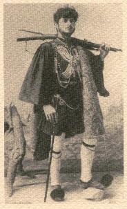 Лаки Дельо, гръцки андартски капитан от Връбник.